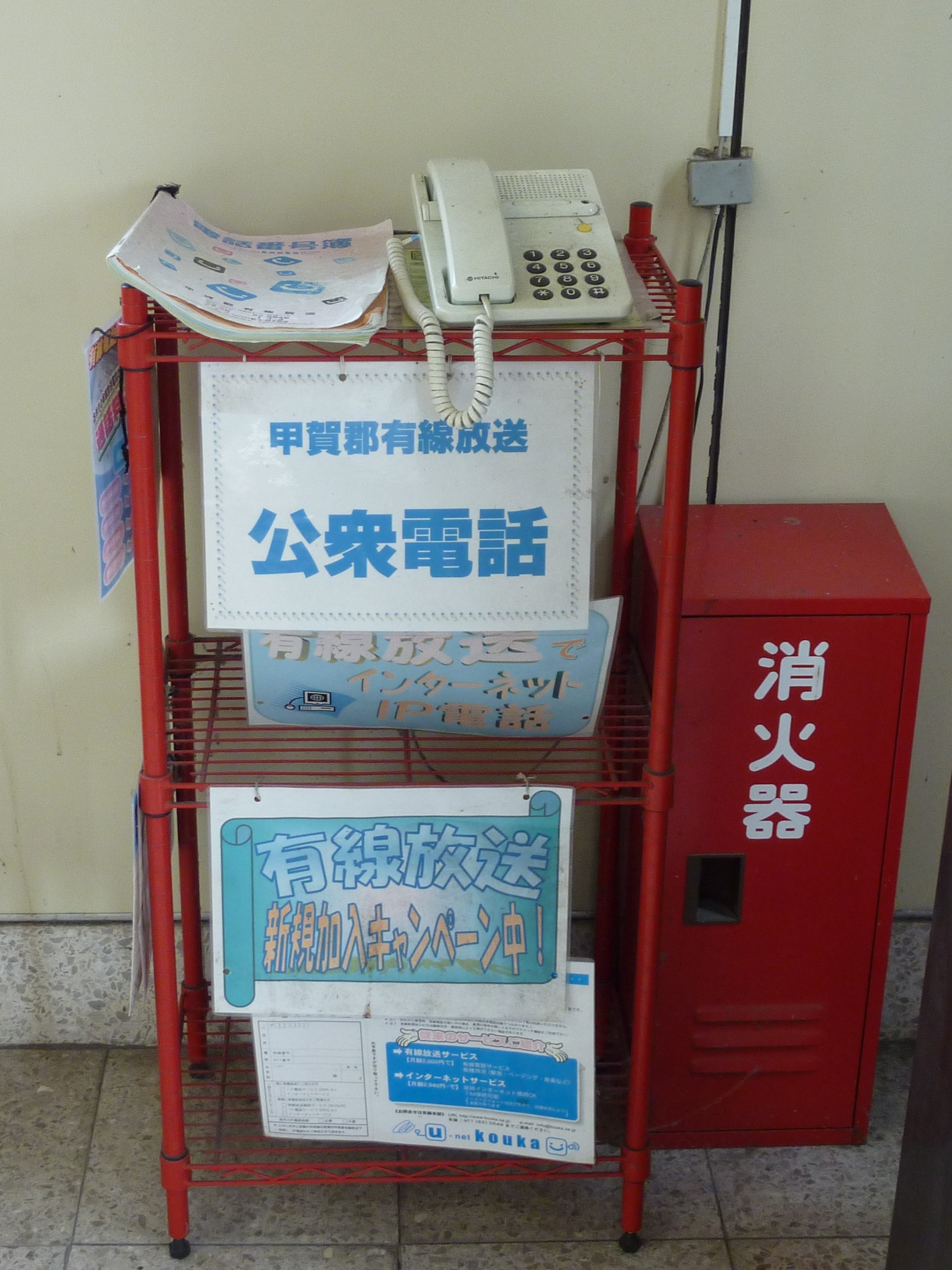 かつて滋賀県甲賀市の貴生川駅に設置されていた旧甲賀郡有線放送の公衆電話。全体図。